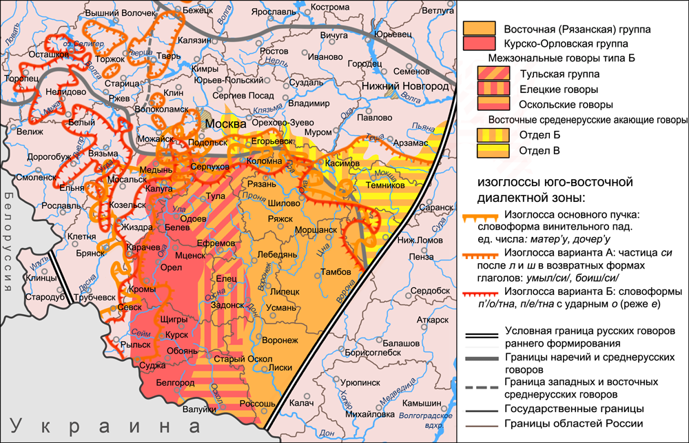 Карта Рязанской группы и соседних с ней говоров в ареалах основного пучка изоглосс и пучков изоглосс вариантов А и Б юго-восточной диалектной зоны. Источники: Захарова К. Ф., Орлова В. Г. Диалектное членение русского языка — 2-е изд. — М.: Едиториал УРСС, 2004. — ISBN 5-354-00917-0, приложение: Диалектологическая карта русского языка (1964 г.). Касаткин Л. Л. Русские диалекты. Лингвистическая география Русские. Монография Института этнологии и антропологии РАН — М.: Наука, 1999, с. 96. Захарова К. Ф., Орлова В. Г. Диалектное членение русского языка — 2-е изд. — М.: Едиториал УРСС, 2004. — ISBN 5-354-00917-0, с. 103—104. Бромлей С. В., Булатова Л. Н., Захарова К. Ф. и др. Русская диалектология / Под ред. Л. Л. Касаткина — 2-е изд., перераб. — М.: Просвещение, 1989. — ISBN 5-09-000870-1, с. 205